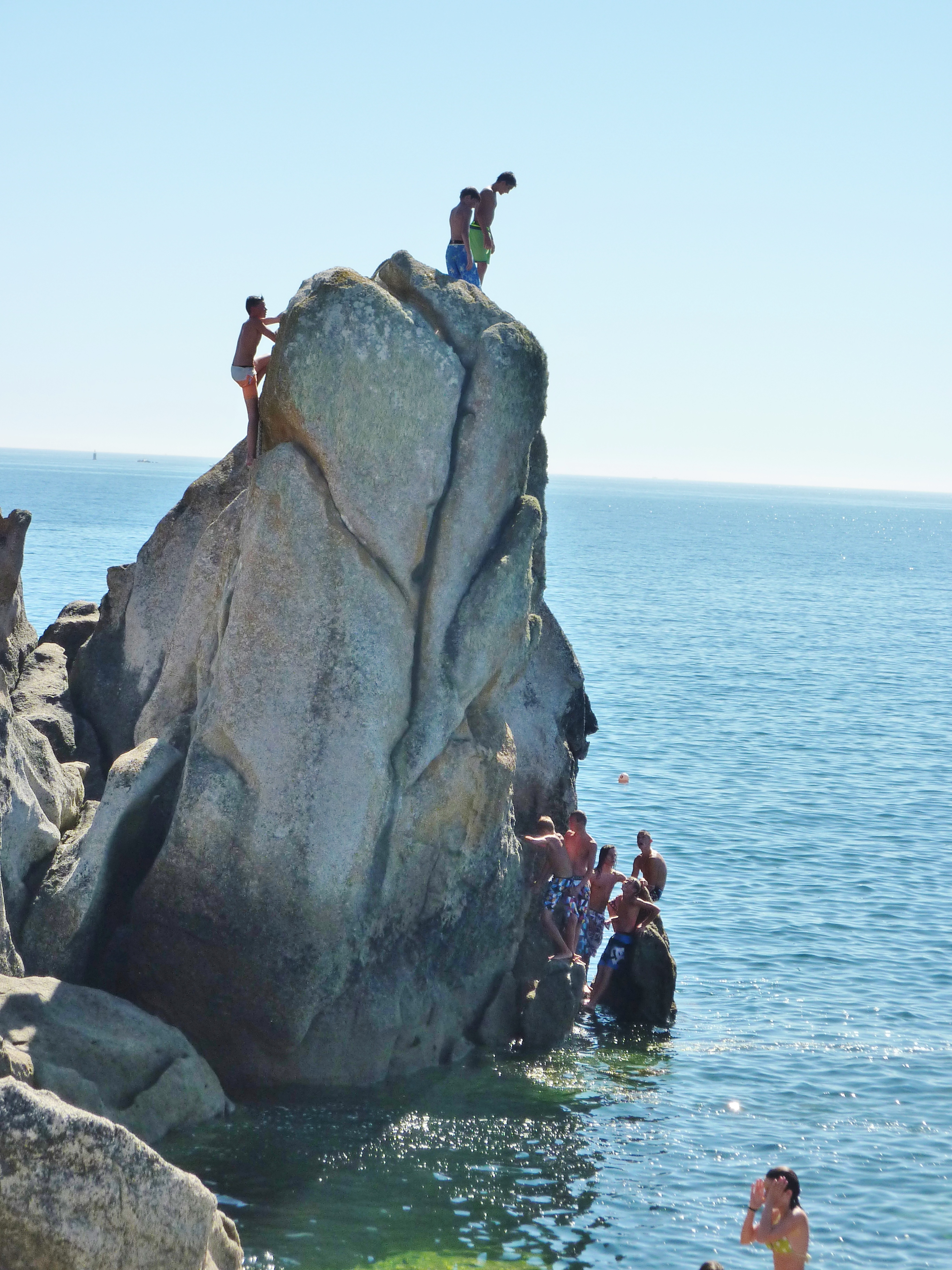 Lesconil : le rocher Goudoul